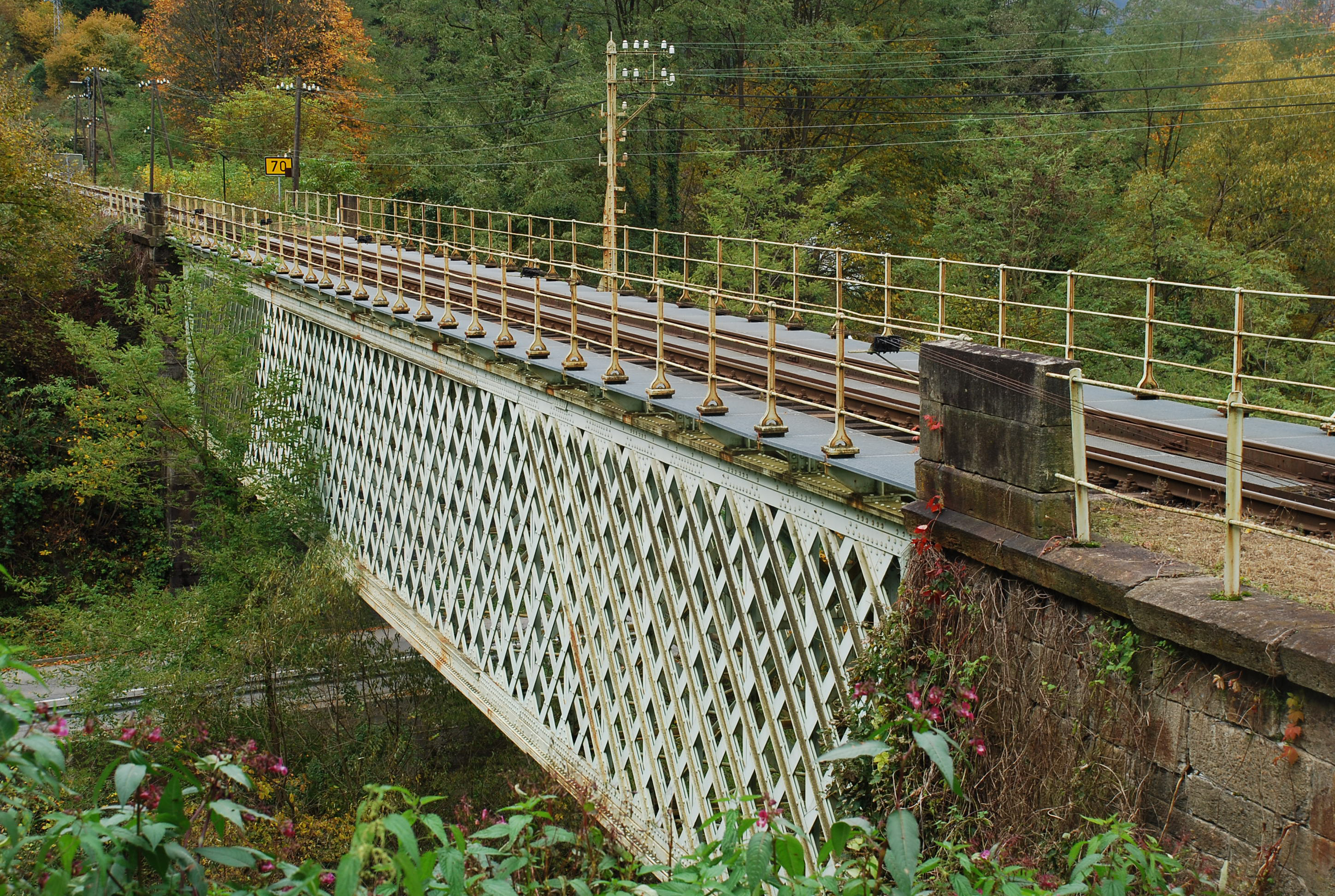 Railway Bridge at Ruta, Lovrenc na Pohorju, Slovenija (St. Lorenzen an der Kärntner Bahn, Drautalbahn)